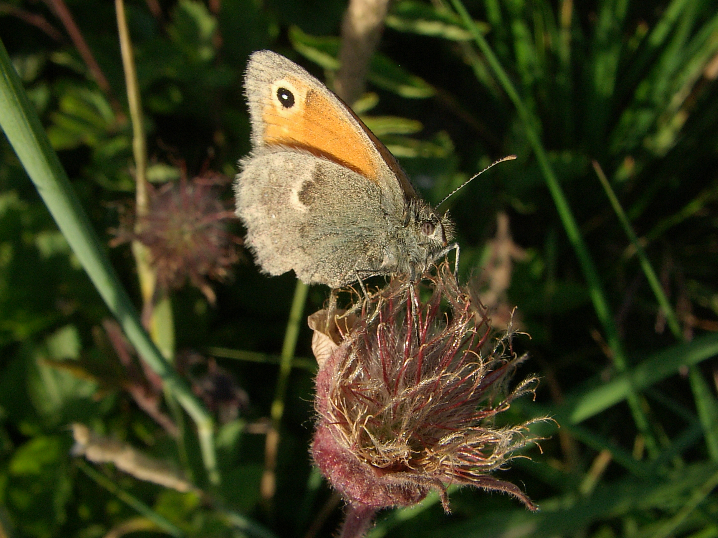 Strzępotek ruczajnik Coenonympha pamphilus